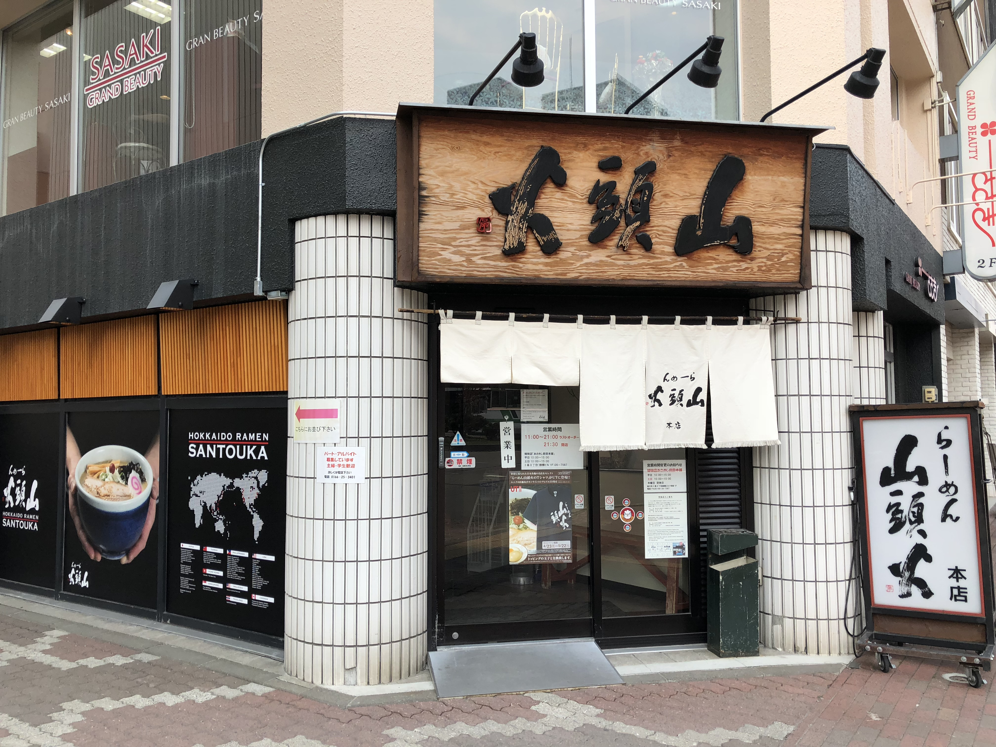 らーめん山頭火本店（旭川市）